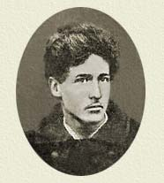 Nikolaj Alekseevič Želvakov